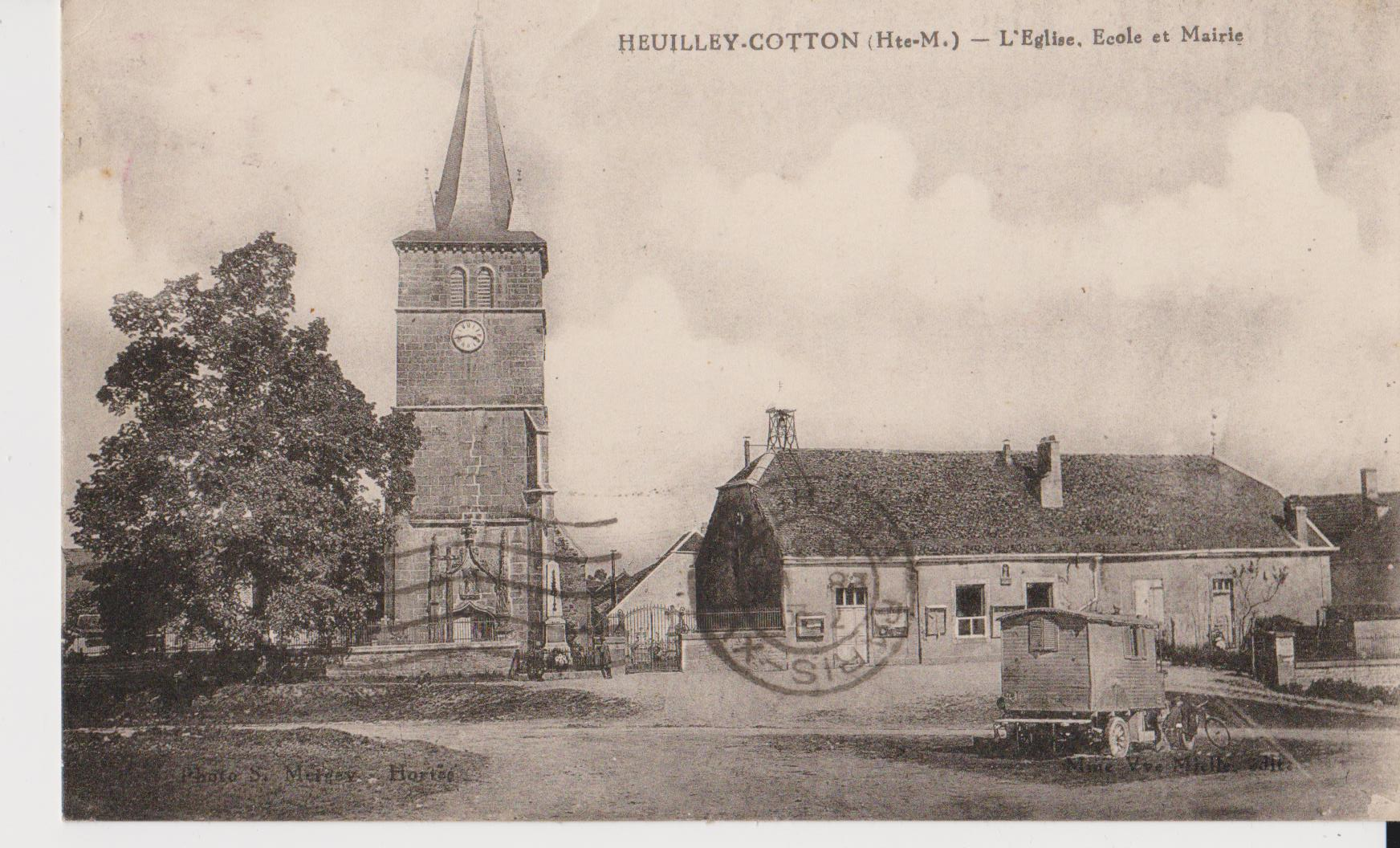 Heuilley-Cotton, l'église, l'école et la mairie